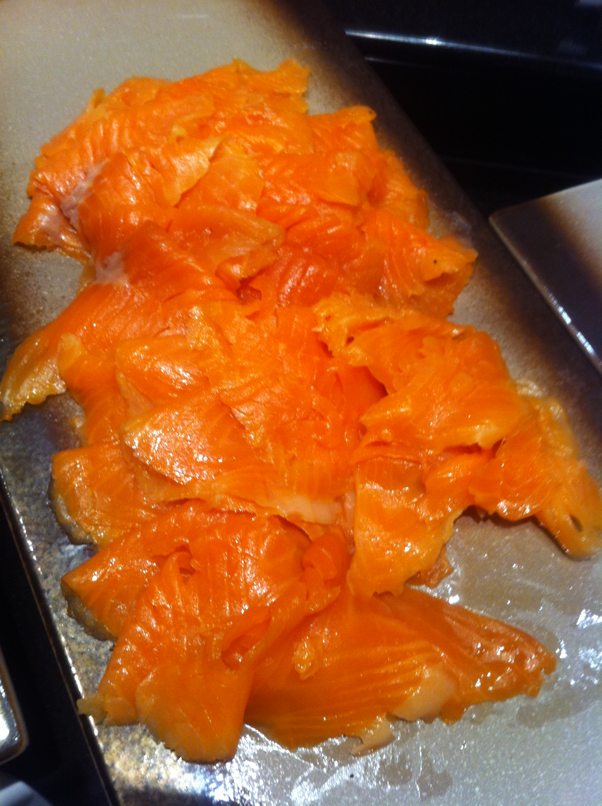 中文（香港）: 香港怡東酒店 自助餐 煙三文魚